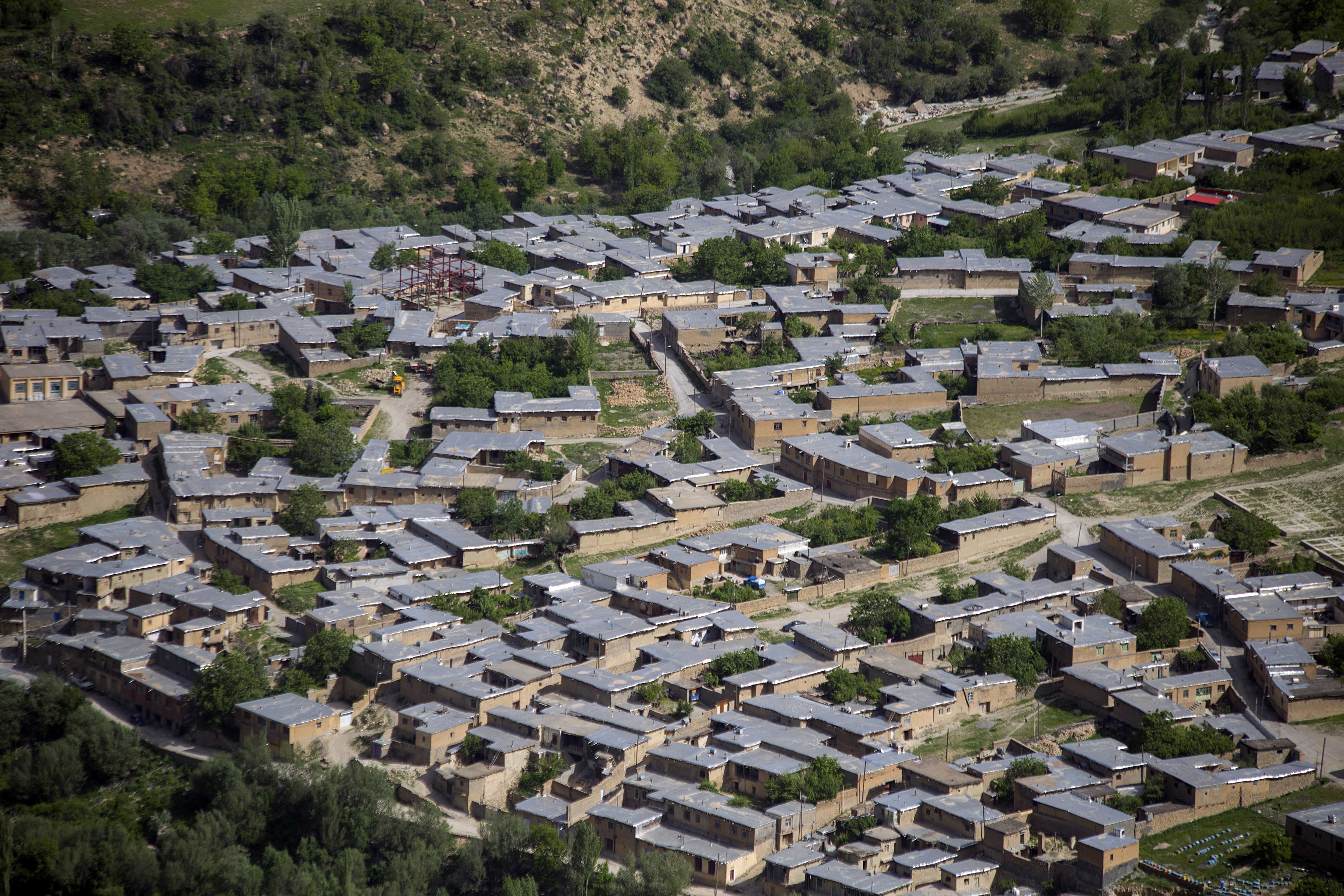 بعضی علت نامگذاری روستا را موقعیت توپوگرافی آن می‌دانند، به طوری که نام اولیه این روستا «خور» به معنای جای گود بوده و این نام به «حفر» و سپس به «خفر» تبدیل شده‌است. همچنین دو امامزاده در این روستا است. روایت دوم کلمه خفر را برگرفته از خور یا غور می‌داند. غور یا غوری نام قبیله یا مردمان اولیه‌ای می‌باشد که در این محل سکونت داشته‌اند. برخی نیز این لغت را برگرفته از گور یا گبر می‌دانند که خود آیینی قبل از اسلام را در منطقه معرفی می‌نماید. روستای خفر به «عروس دنا» نیز معروف است.